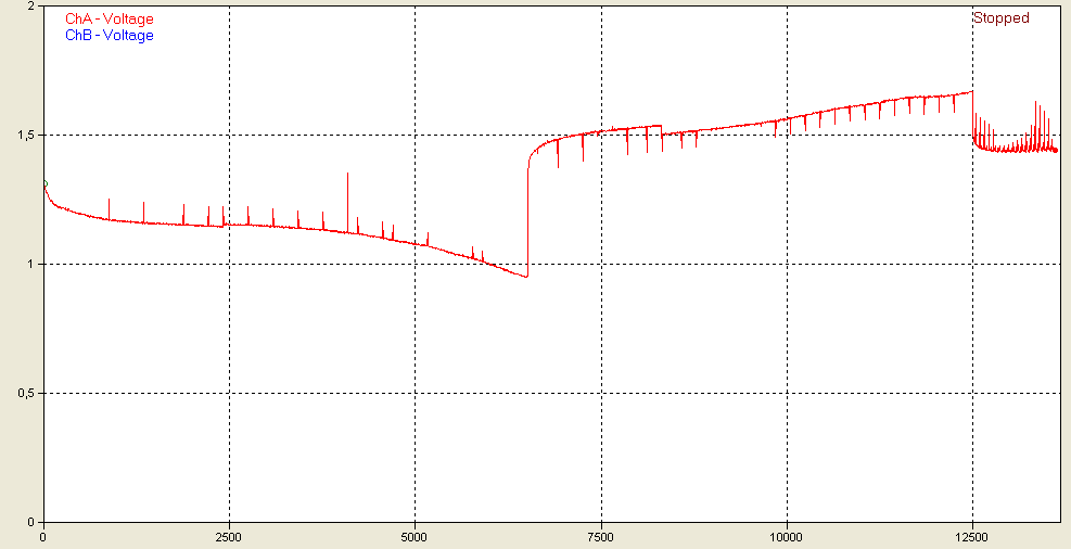 Spannungsverlauf einer Akkuladung einer 800mA NiCd Mignonzelle. Zuerst ist die Entladung zu sehen, dann die Ladung. Nach der Ladung schaltet das Ladegerät auf Ladungserhaltung um.